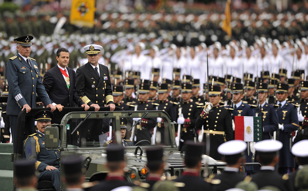 Desfile militar conmemorativo de la Independencia de México. México, D.F. 16 de septiembre de 2013.